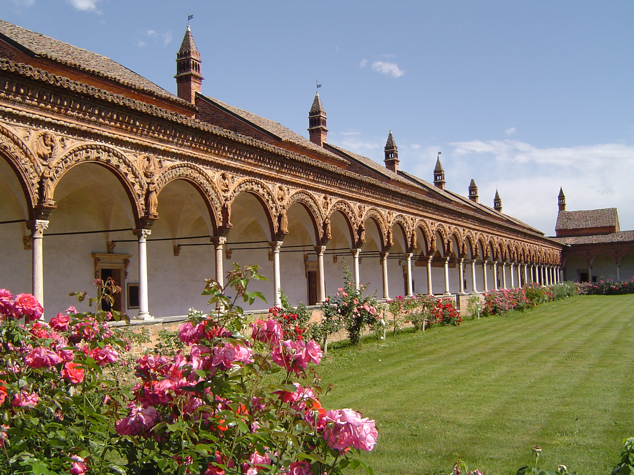 The grand cloister at the Certosa di Pavia. Chiostro grande della Certosa di Pavia.